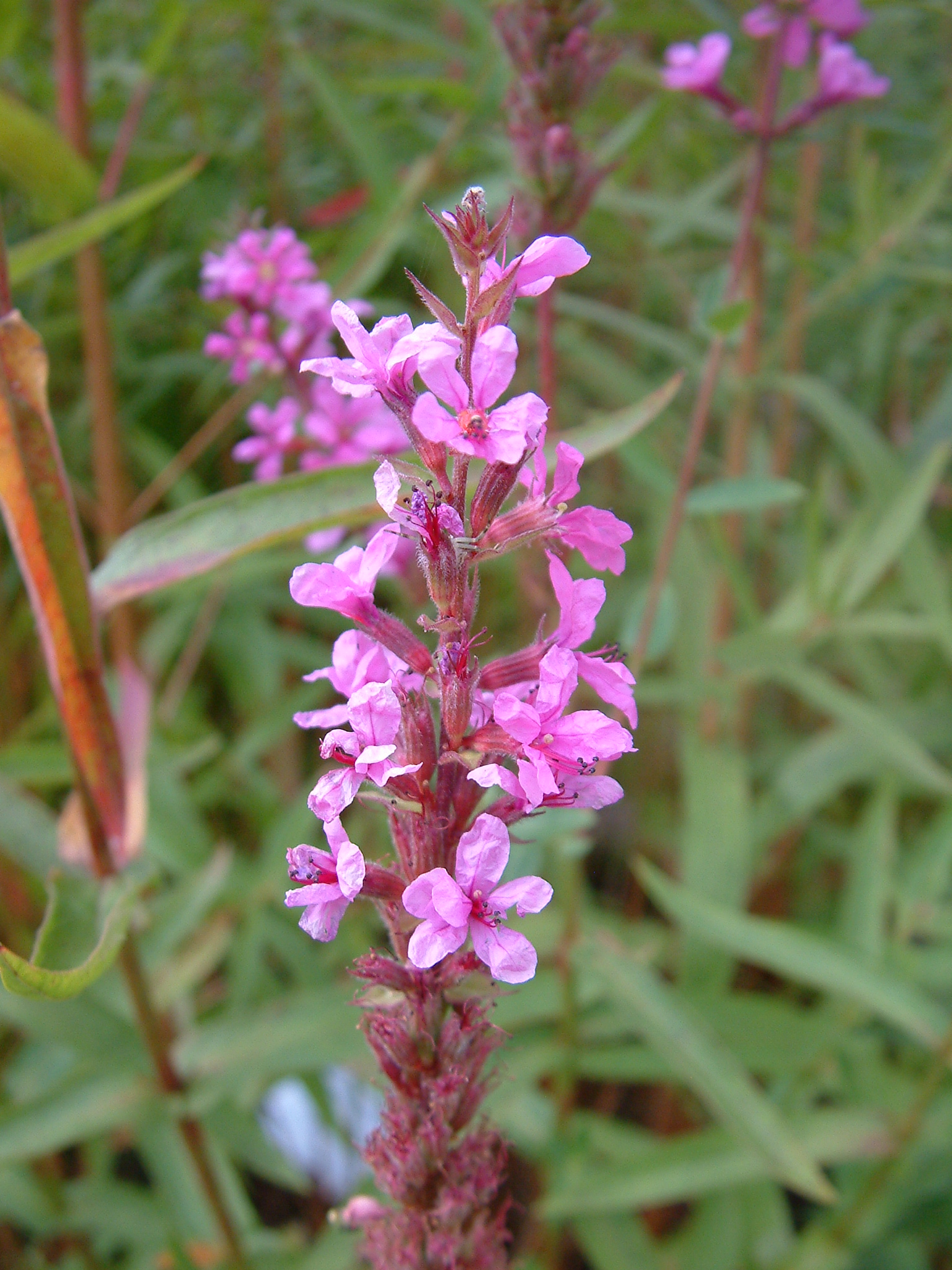 Lythrum virgatum, Botanical Garden in Poznań